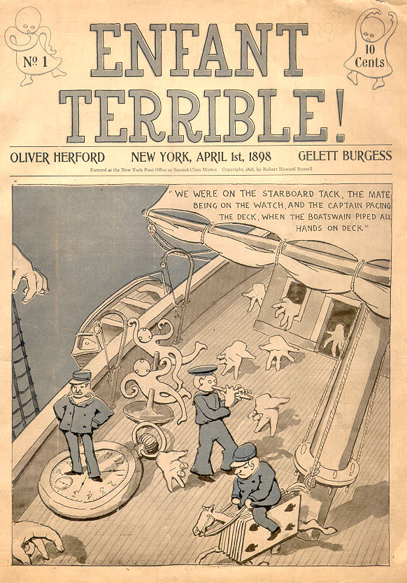 Title -- Enfant Terrible! Publisher -- R. H. Russell : New York Editors -- Gelett Burgess; Oliver Herford; Carolyn Wells Illustrations --Sample 1 Notes -- v.1:no. 1 (1898: Apr. 1) only issue published. Nesbitt Room Holdings -- v.1:no. 1 (1898: Apr. 1) Elizabeth Nesbitt Room Journal Collection